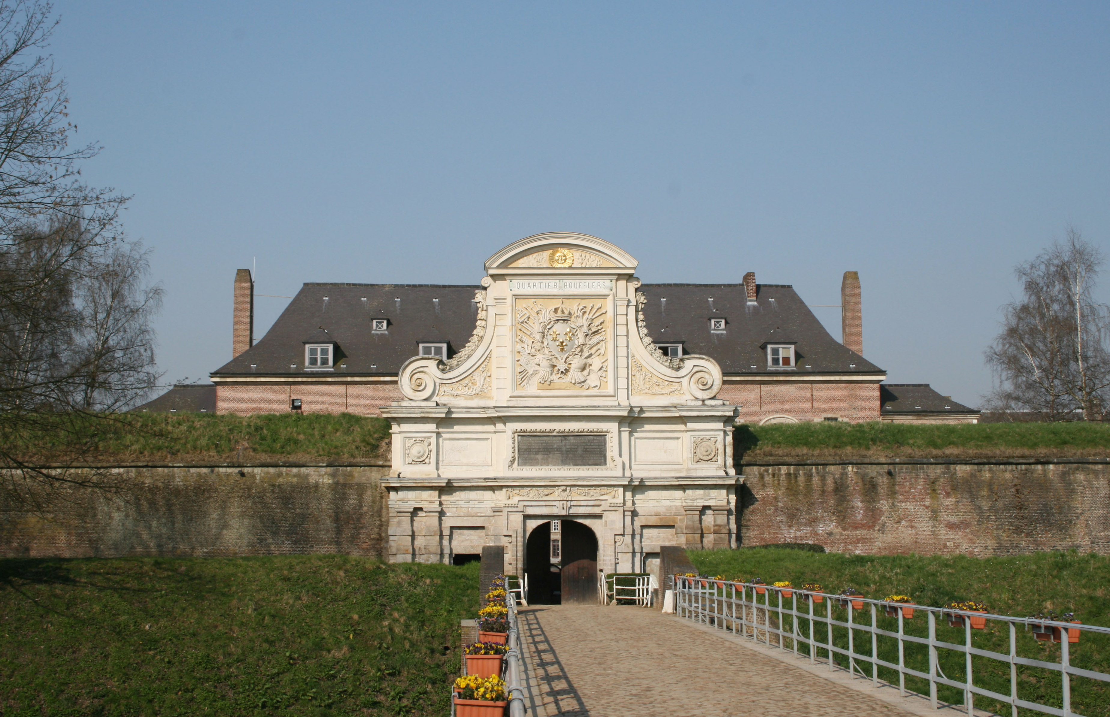 Caserne Boufflers dans la Citadelle Vauban à Lille